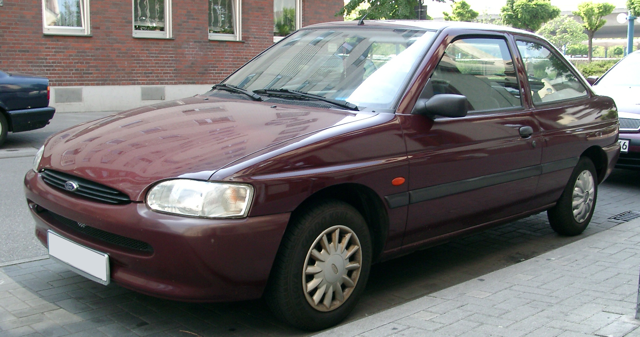 Ford Escort Mk7